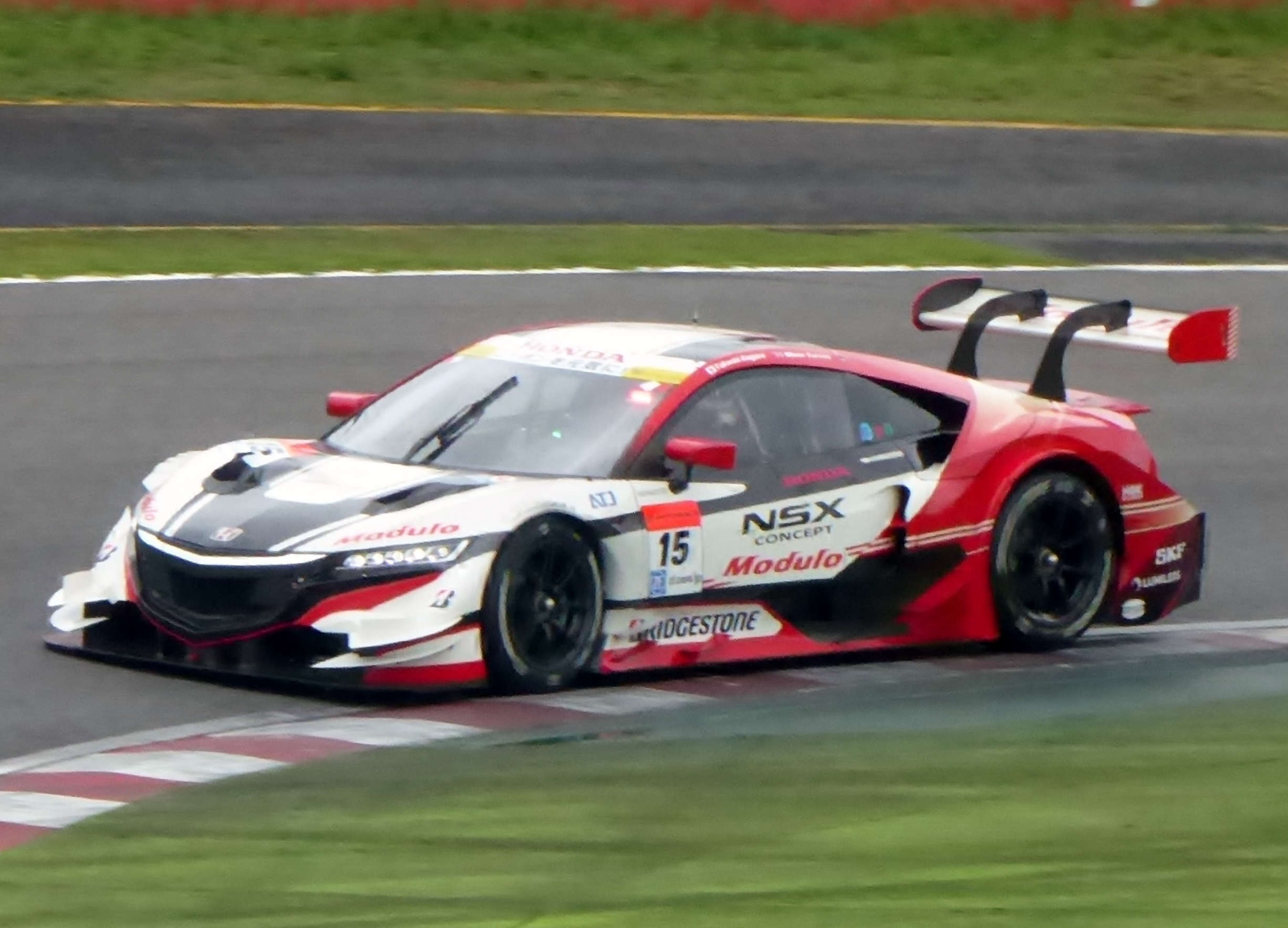 2015年鈴鹿1000㎞において15号車ドラゴモデューロNSX CONCEPT-GTを撮影。